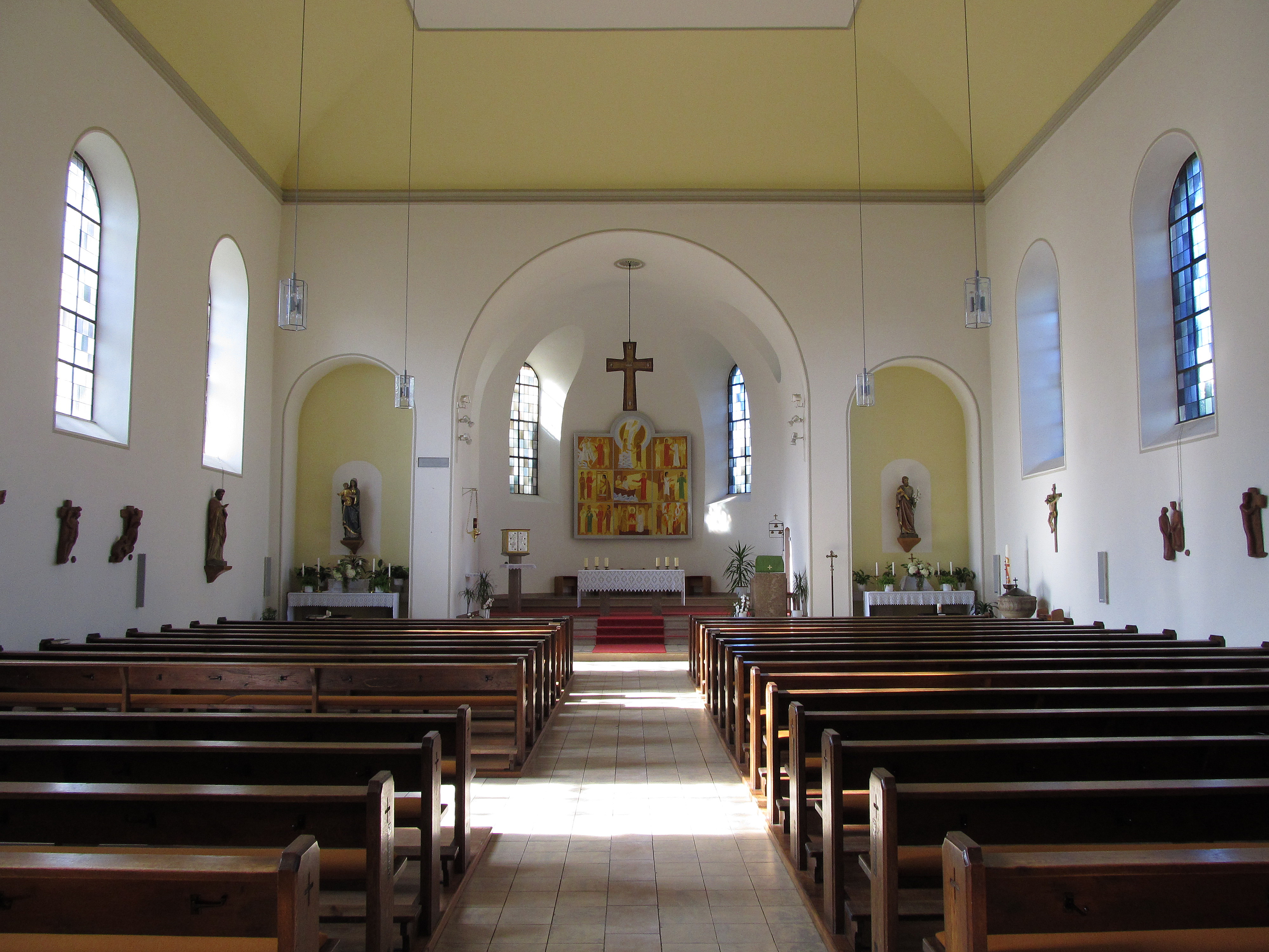 Blick ins Innere der katholischen Pfarrkirche St. Alban in Gersheim, Saarland